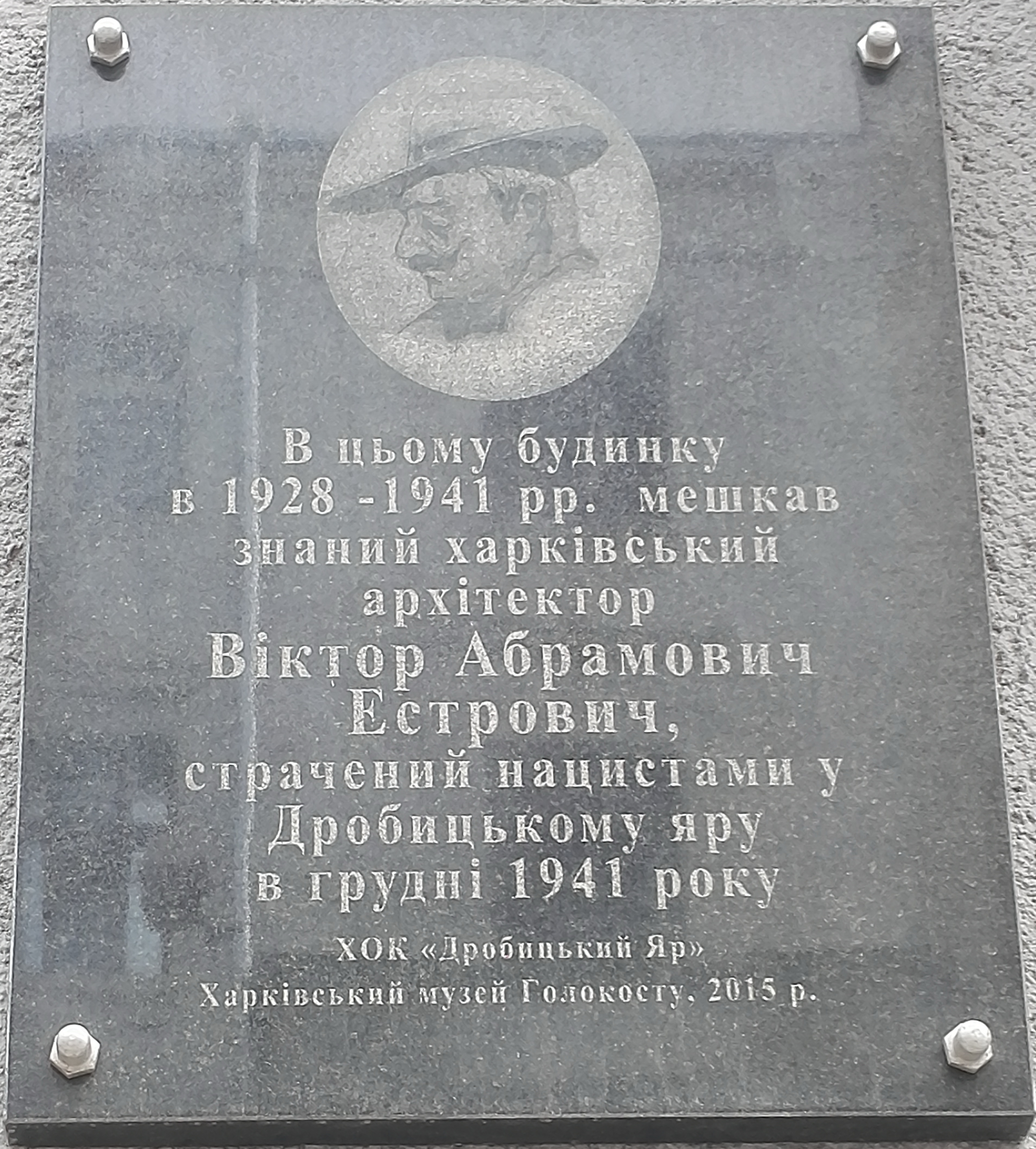 Дошка на будинку де мешкав Віктор Абрамович Естрович